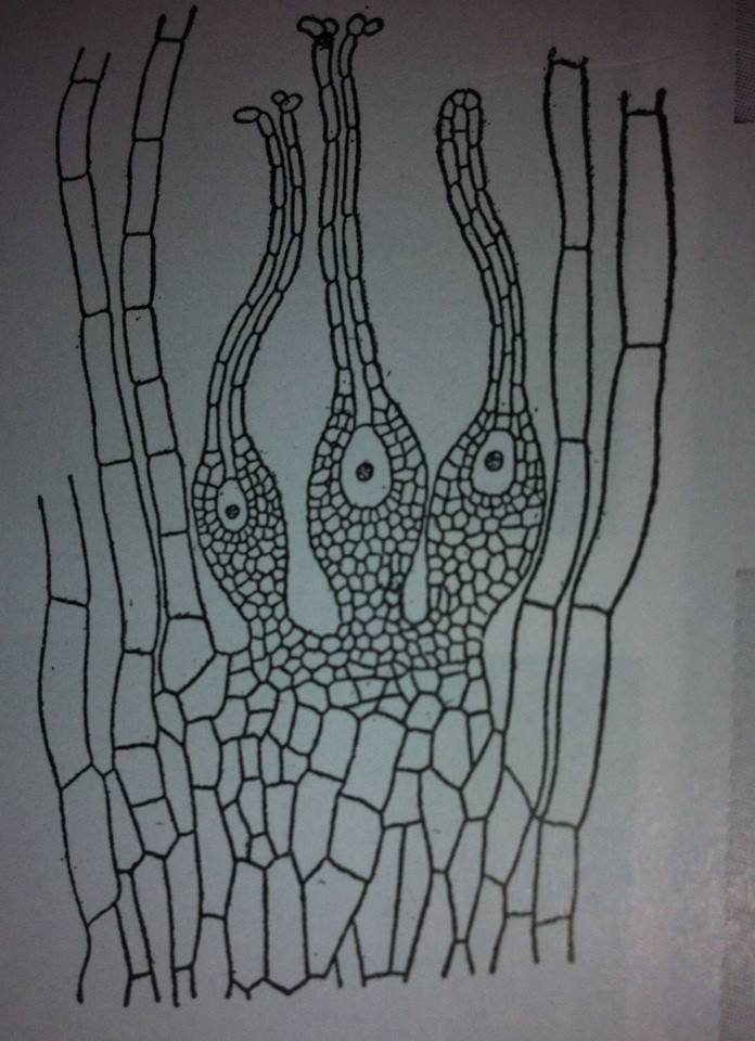 Arquegonios de funaría en sección longitudinal